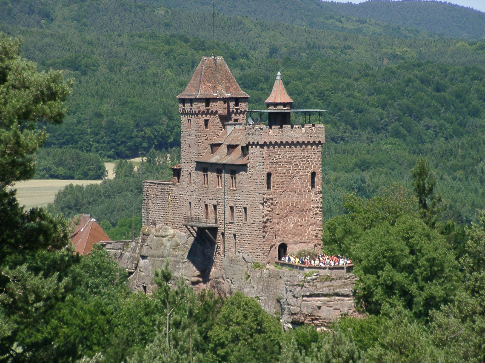 Burg Berwartstein von der Vorburg Klein-Frankfreich aus gesehen.